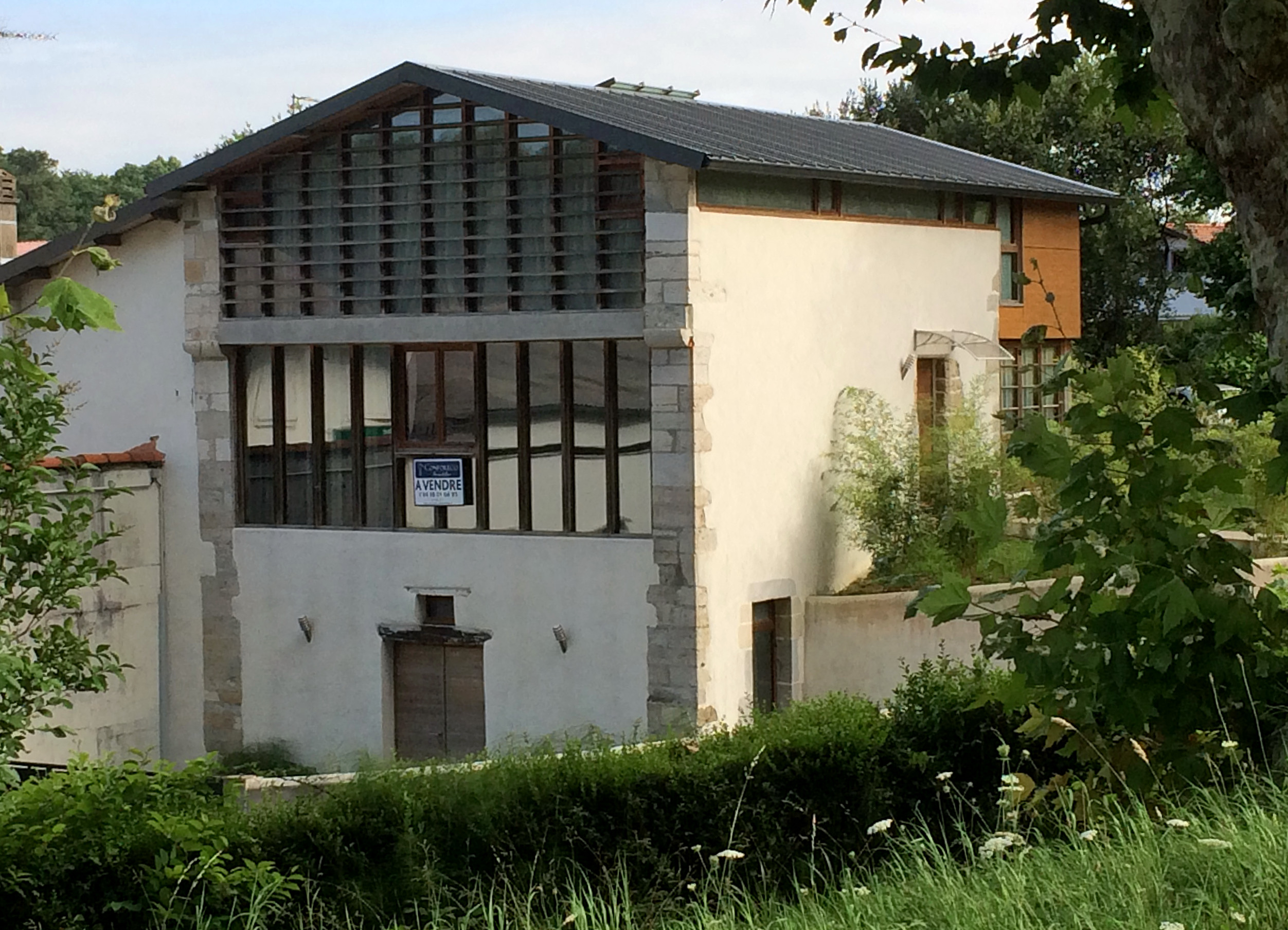 ancien moulin Anglet